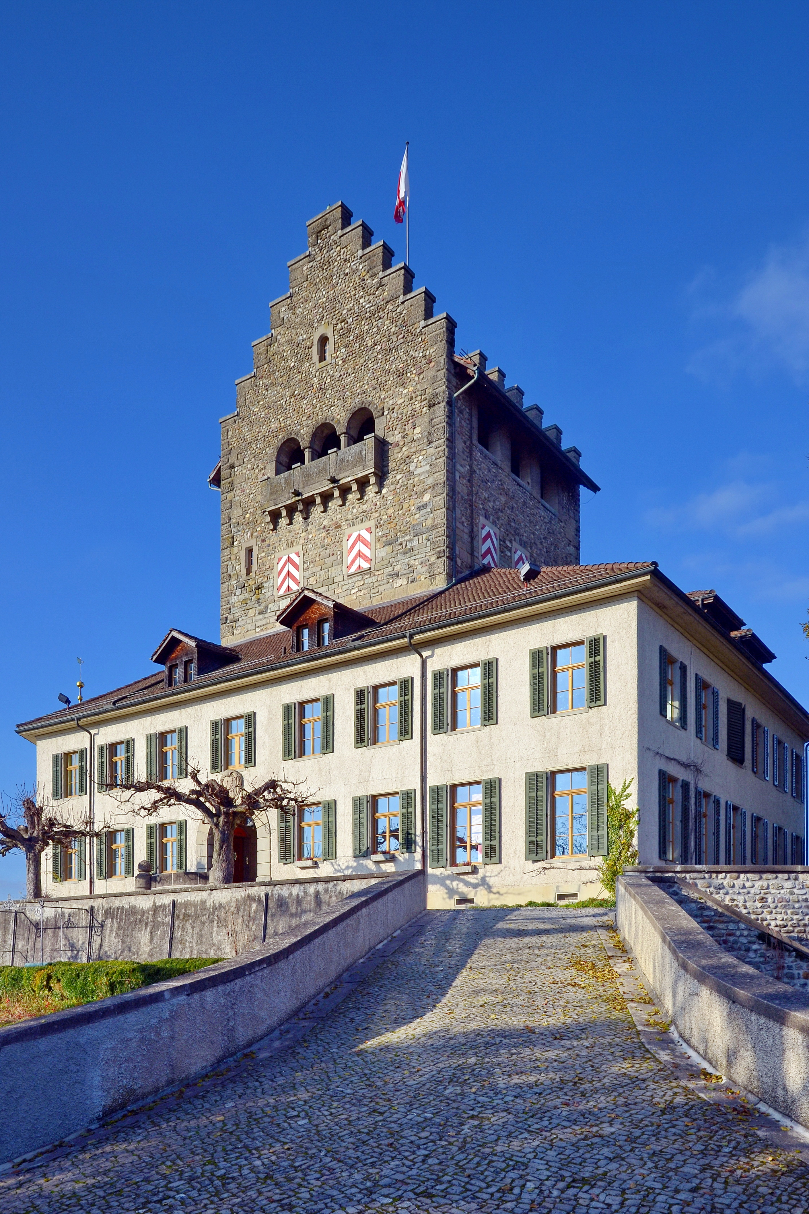 Schloss in Uster (Switzerland)